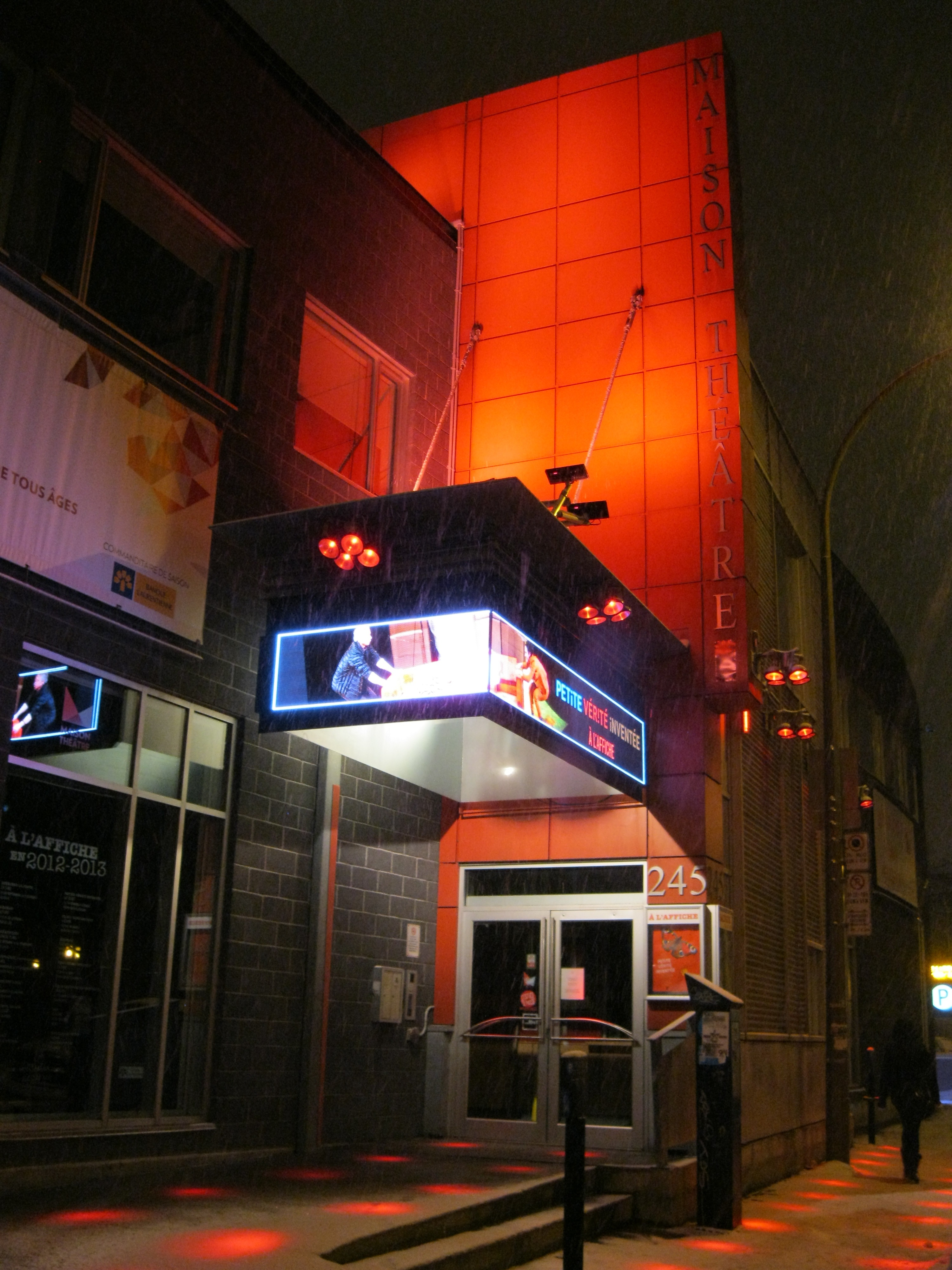 Maison Théâtre, 245, rue Ontario Est, Montréal